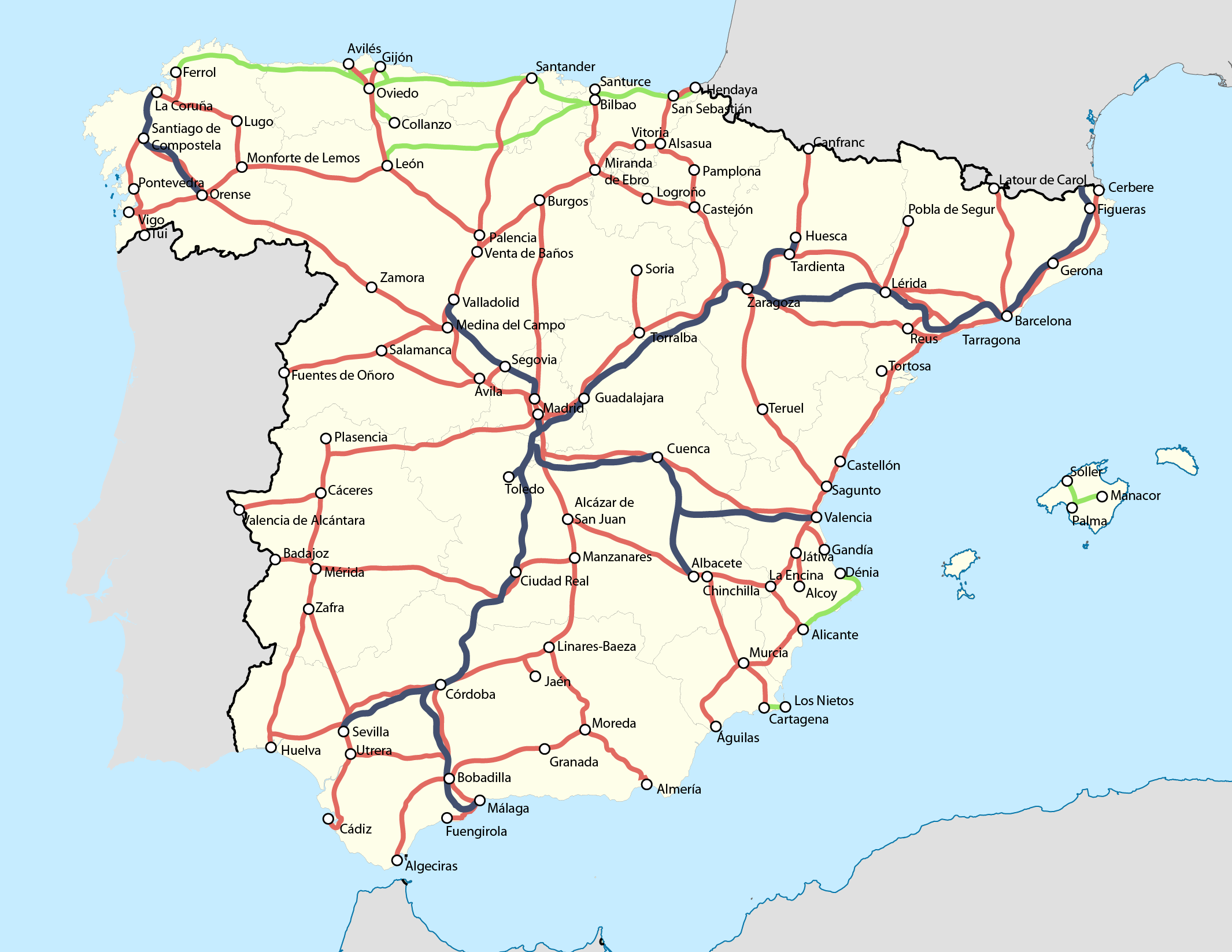 Red actual de ferrocarriles de España, tanto de ancho ibérico como europeo. Versión 3.0.